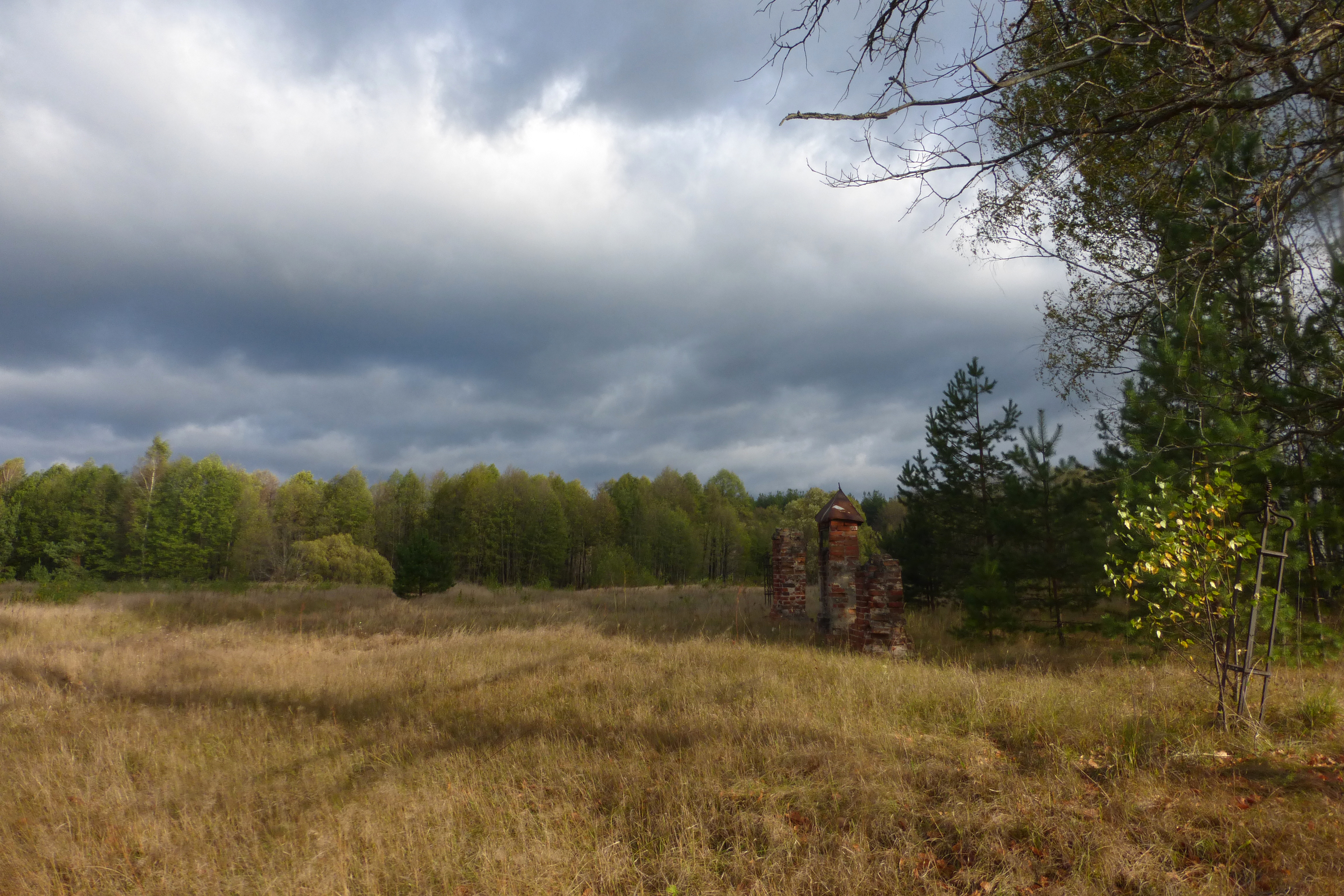 Остатки ворот Успенской церкви